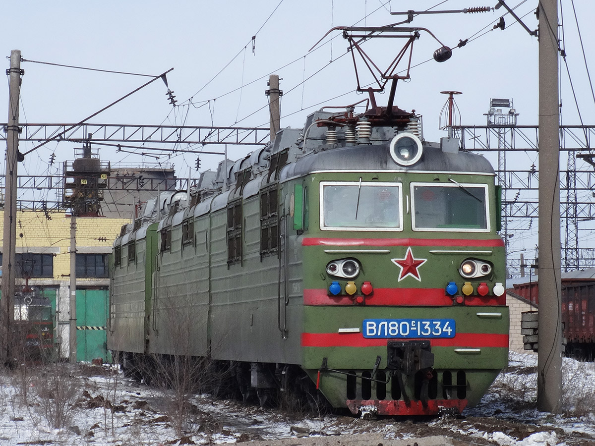 Когда-то был приписан к ТЧ Агадырь. Теперь там вместо ТЧ небольшой ЛРЗ по ходовке "выльников".